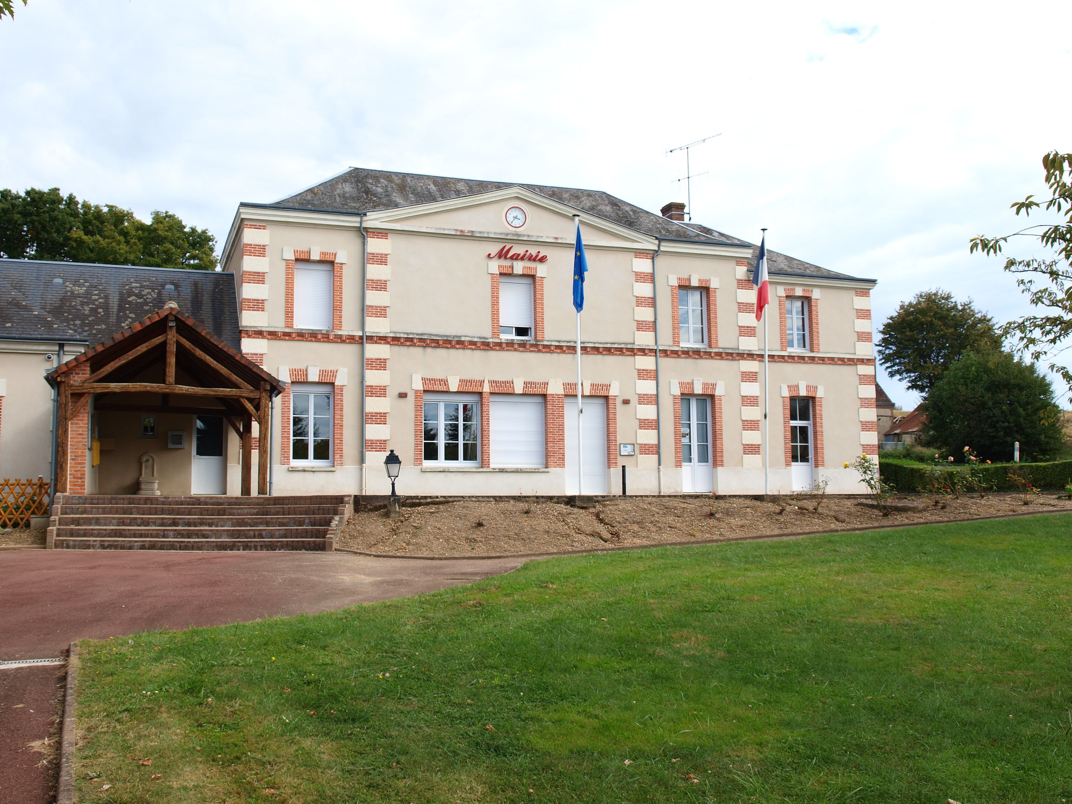 Busloup (Loir-et-Cher, France) ; mairie